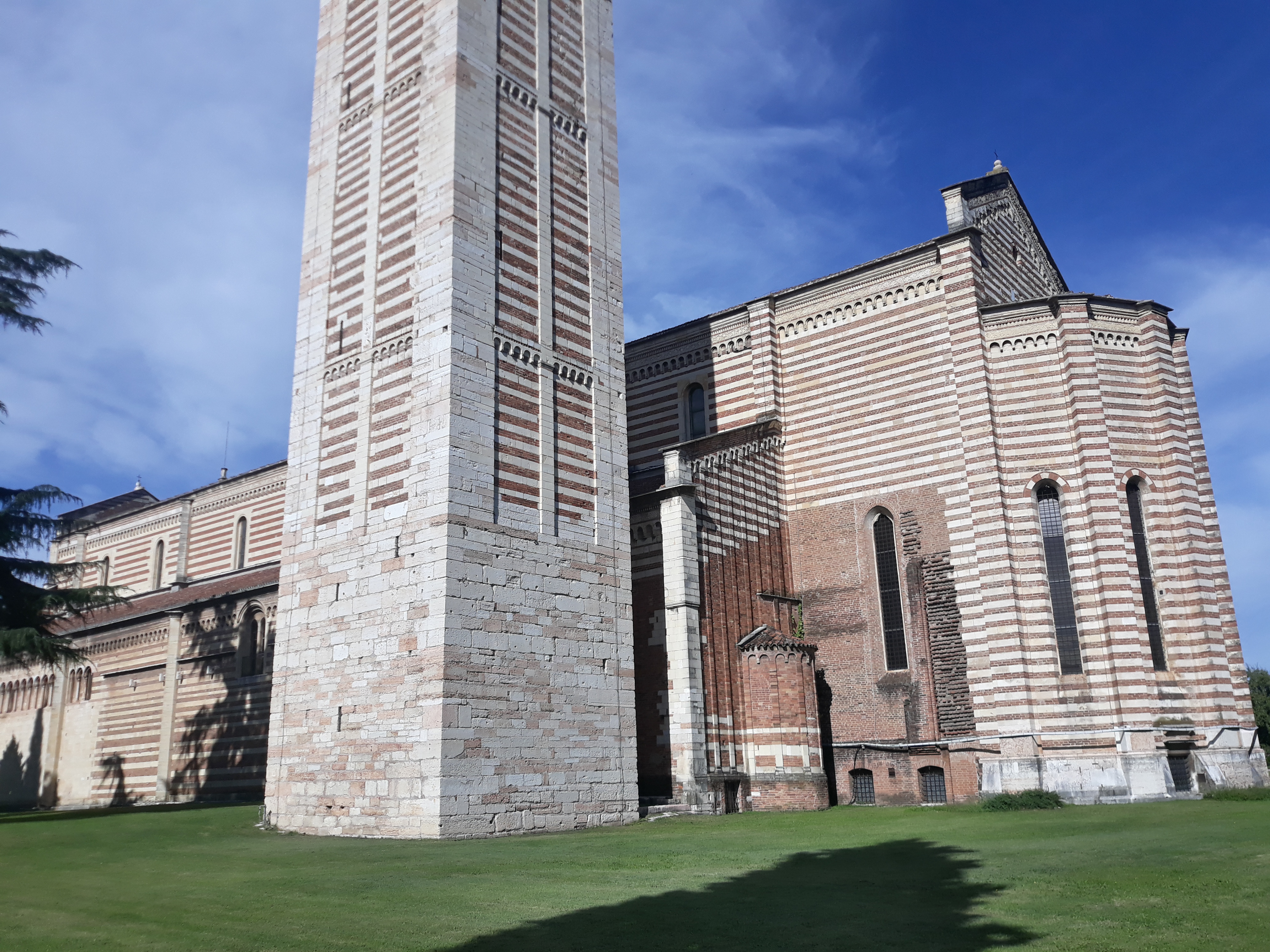 Basilica di San Zeno a Verona